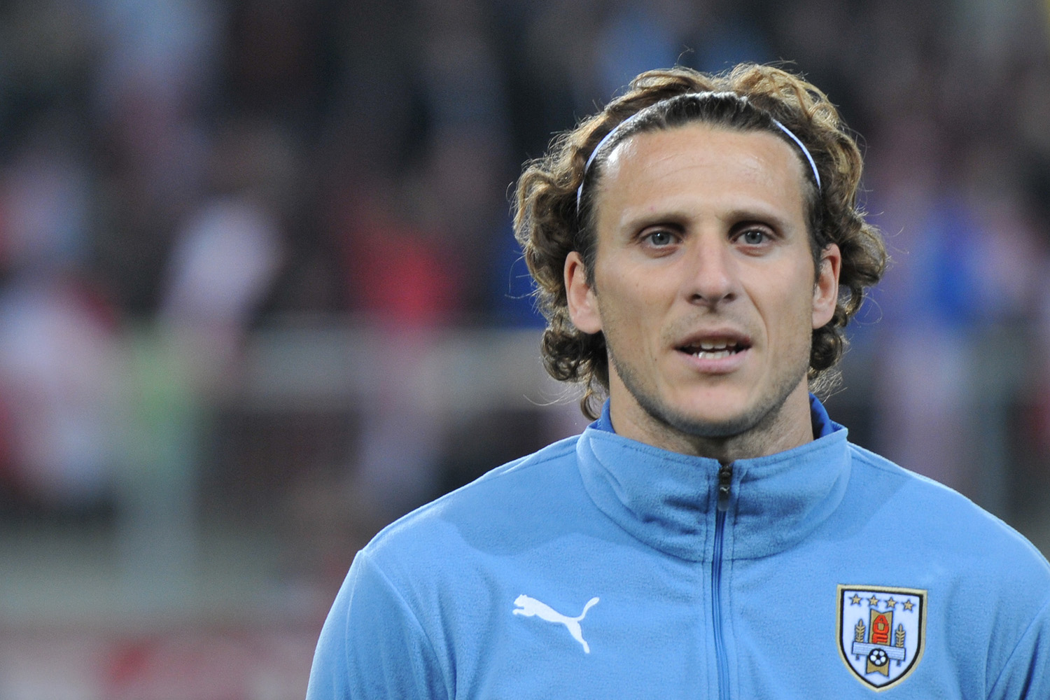 Freundschaftliches Länderspiel Österreich - Uruguay am 5. März 2014 in Klagenfurt: Diego Forlán